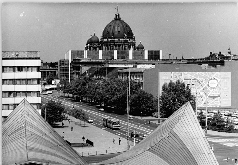 ADN-ZB Senft-28.6.82 Berlin: Schöne DDR- Von den Hochhäusern der Fischerinsel sieht man den Berliner Dom. Vorn die Breite Straße. Das Wandbild, ein historischer Stadtplan, stammt von Lutz Brandt.